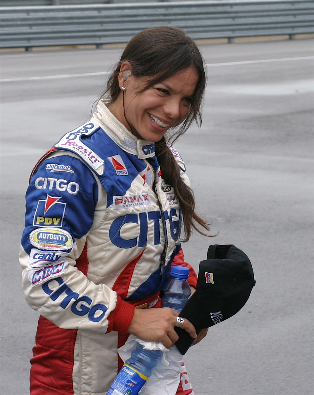 Driver Milka Duno.